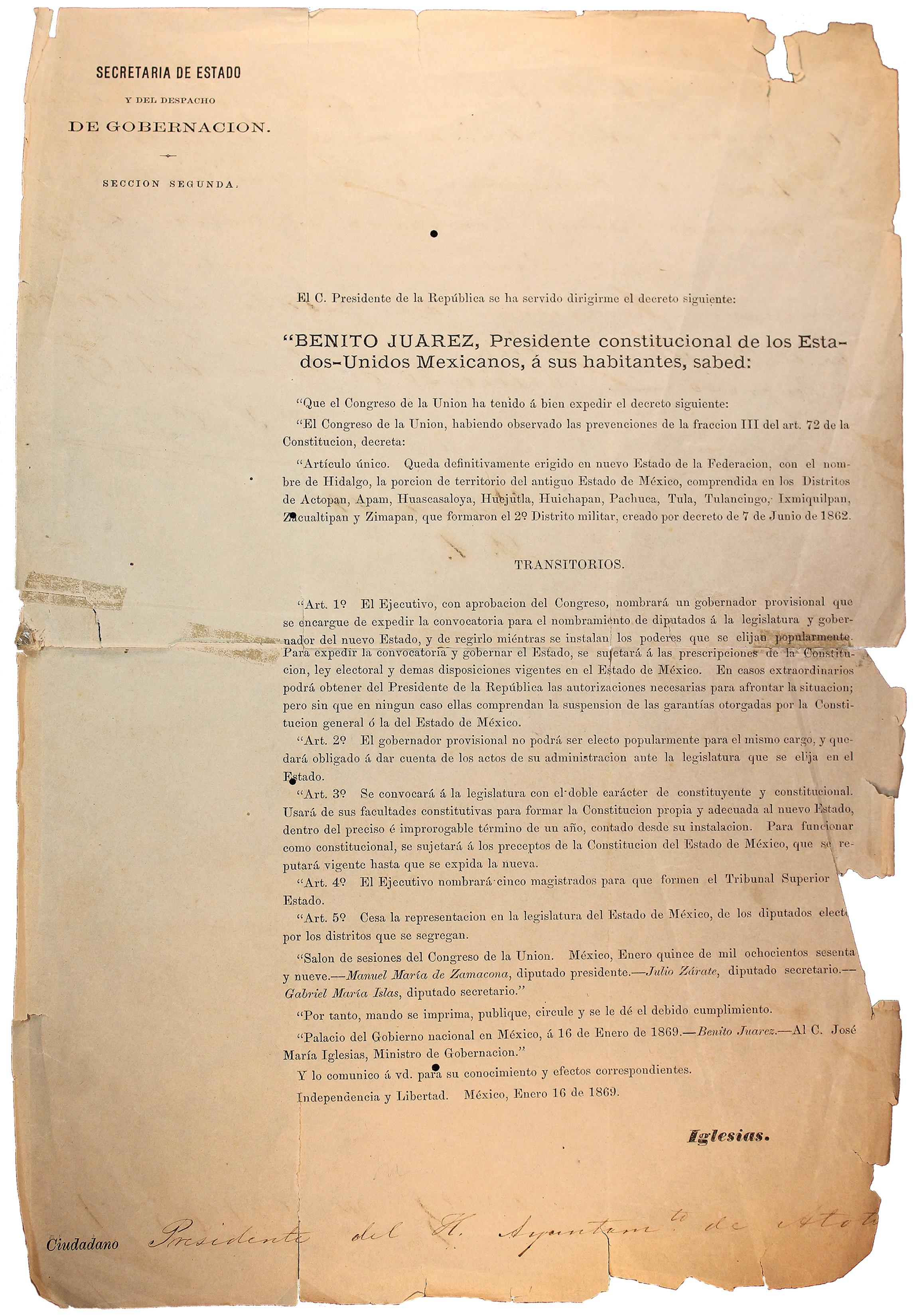 Decreto de Benito Juárez, Presidente Constitucional de los Estados Unidos Mexicanos, por el cual se erige un nuevo estado de la federación con el nombre de Hidalgo, Fondo Atotonilco, Serie Bandos y Decretos, 16 de enero de 1869.